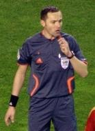 Partido amistoso España - Inglaterra celebrado el 11 de febrero de 2009, en el estadio Sanchez Pizjuán(Sevilla)